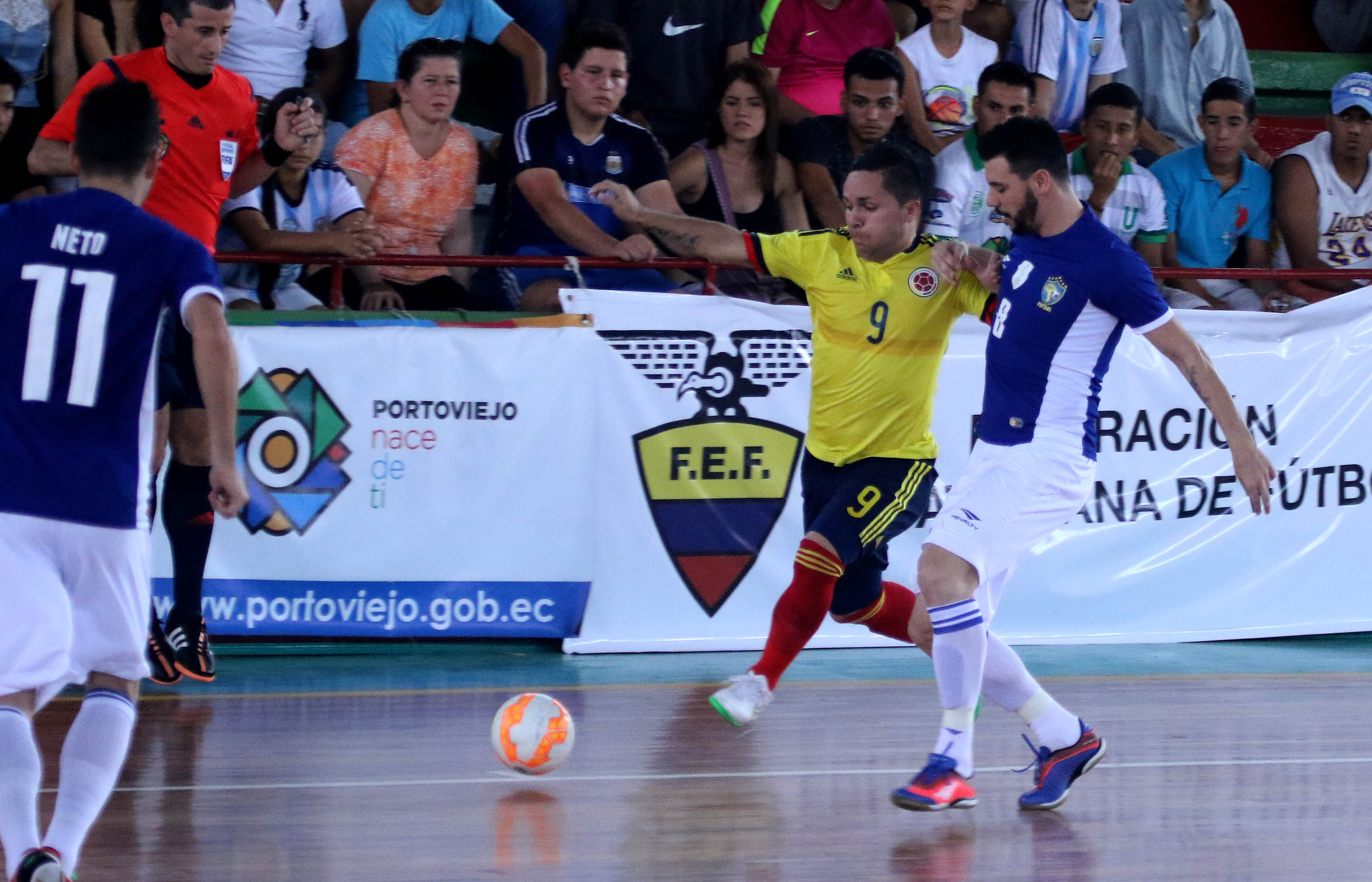 Portoviejo, Manabí, 30 de ago del 2015 (Andes).-Brasil se impuso 4x0 a Colombia y se quedó con el tercer lugar en la Copa América de fútbol sala. Foto:César Muñoz/Andes